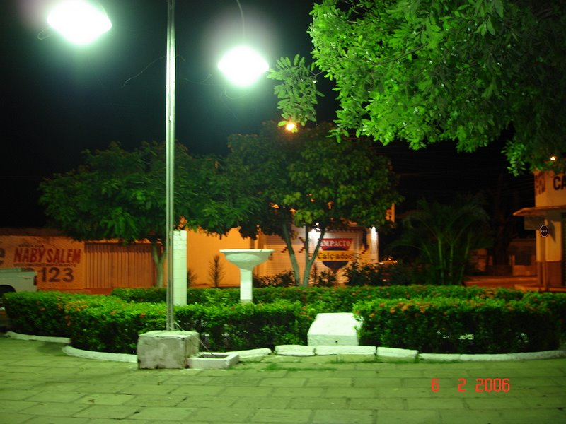 Foto a noite na praça Alcebiades Silva- Centro da Cidade